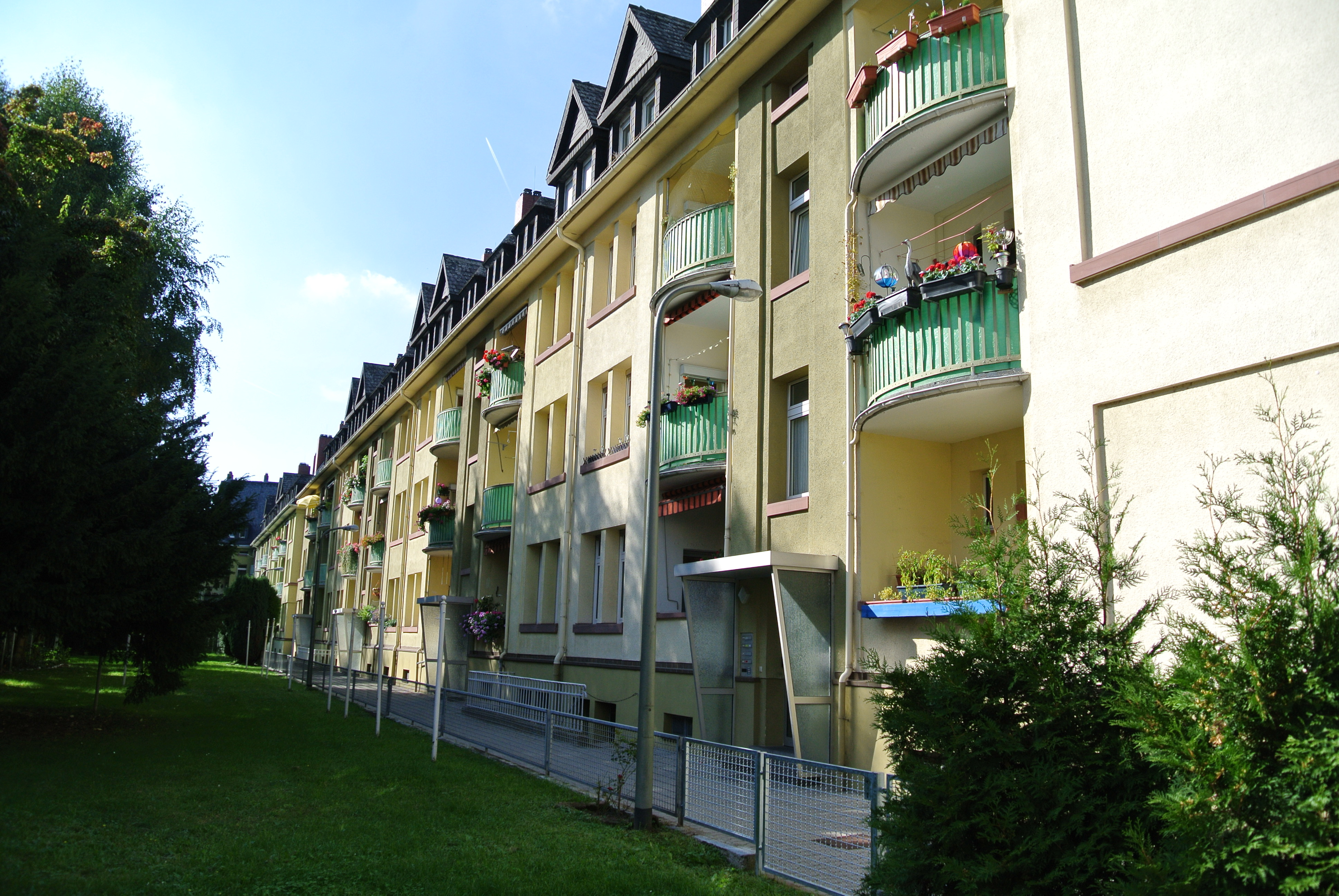 Siedlung Dornbusch Ost aus den 1920er und 1930er Jahren, Horseite der Bebauung an der Schwabstraße